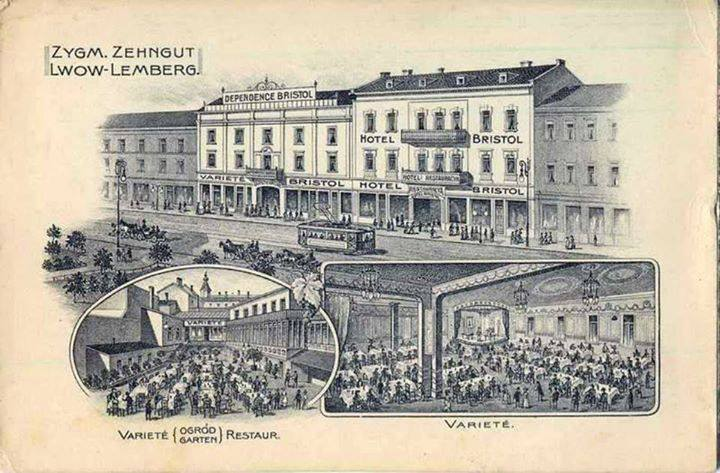 проспект Свободи Львів